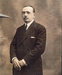 Antonio Castillo Lastrucci